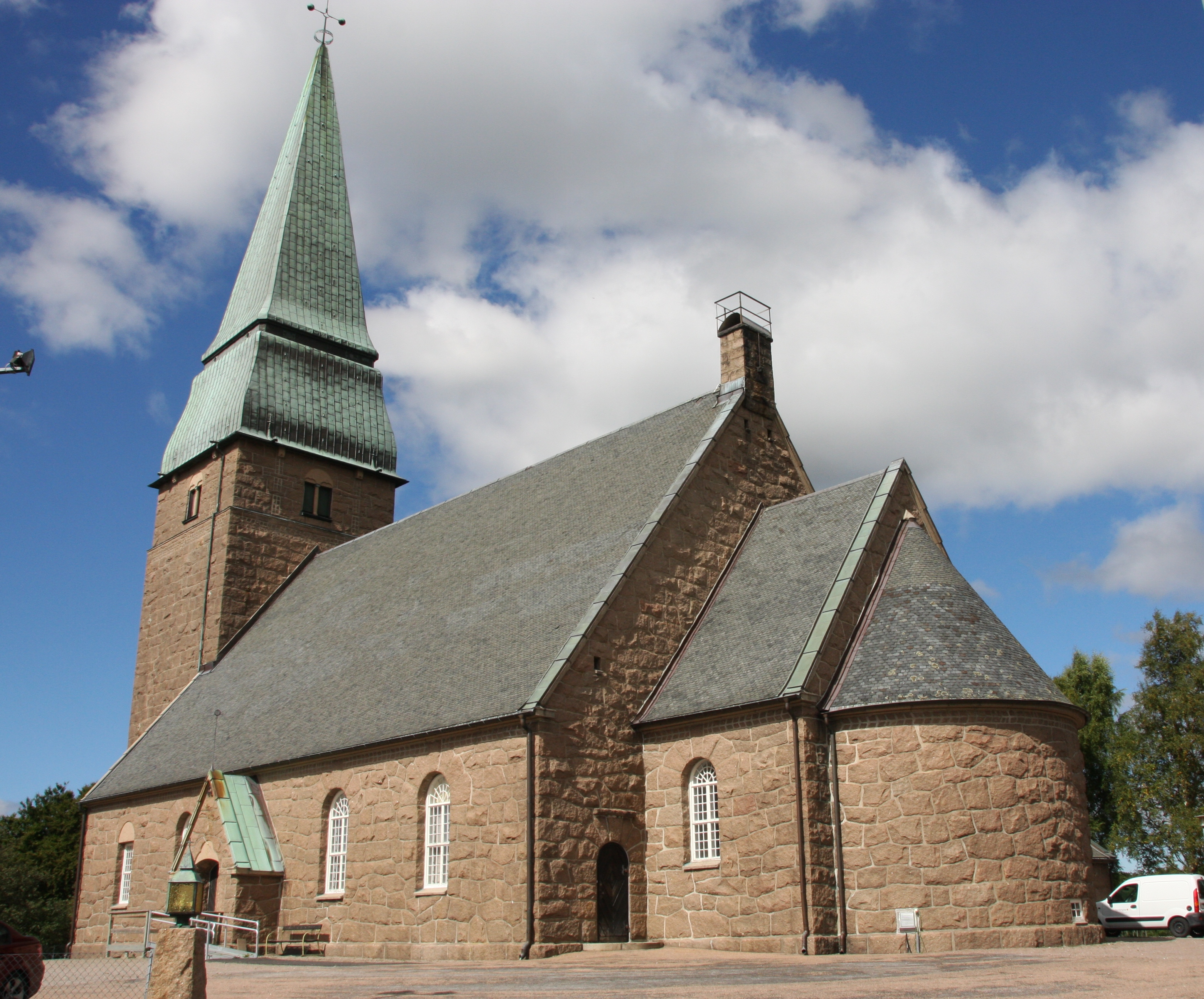 Lyse kyrka i Lysekils kommun, västra Sverige